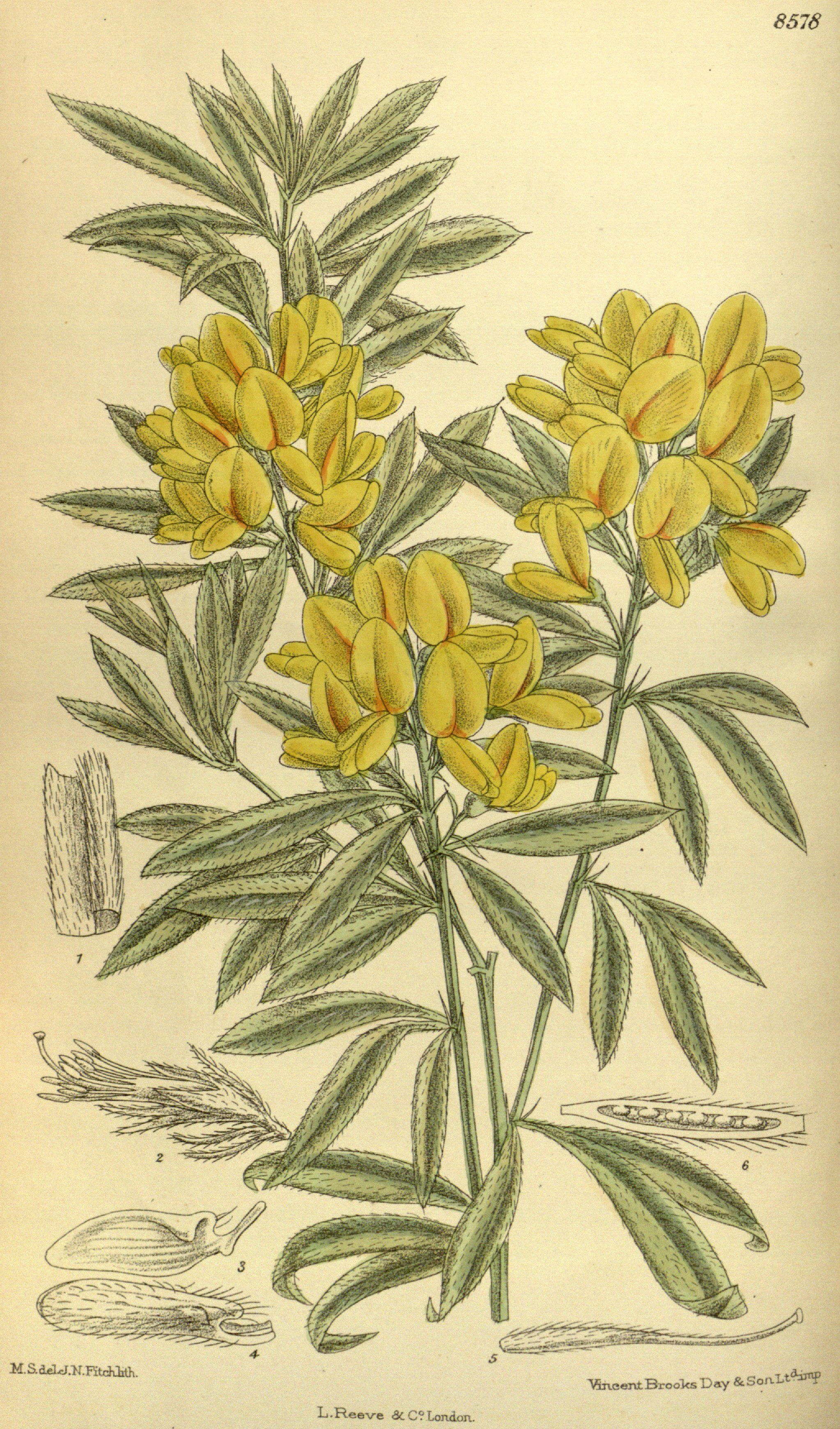 Cytisus pallidus (= Genista linifolia), Fabaceae